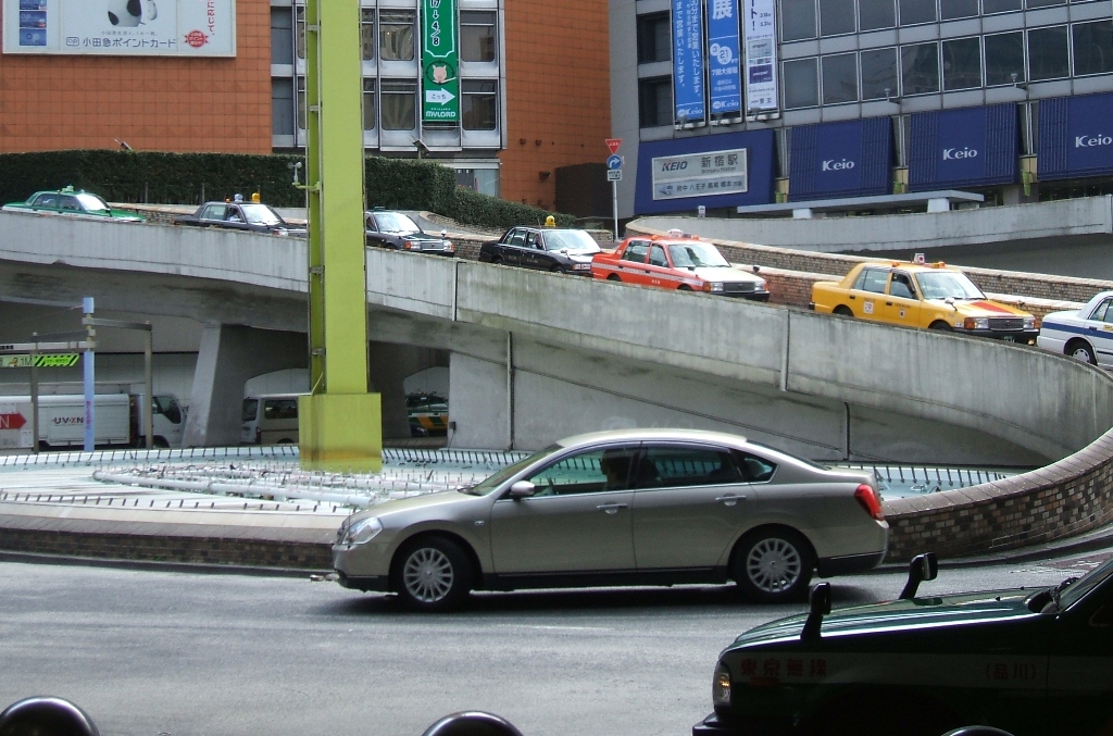 新宿駅西口の小型タクシー乗り場。本人撮影。